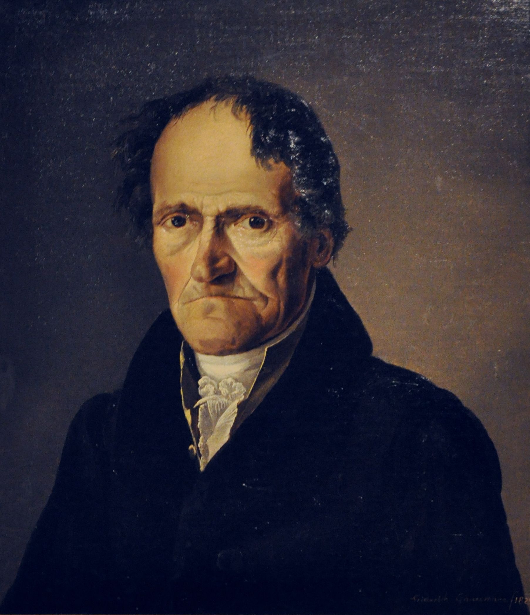 Bildnis des Klaviermachers Anton Walter (im Alter von 73 Jahren), geboren in Neuhausen auf den Fildern